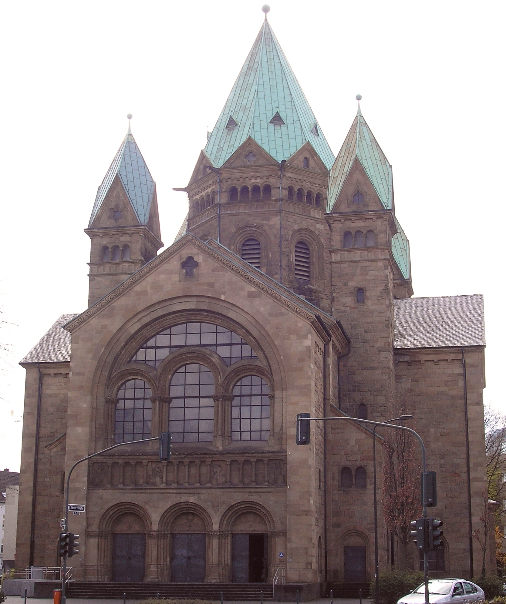 Kreuzkirche Düsseldorf (Frontansicht)